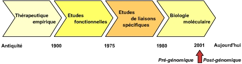 Historique dela conception des médicaments suivant les différentes ères de la biologie et de la pharmacologie